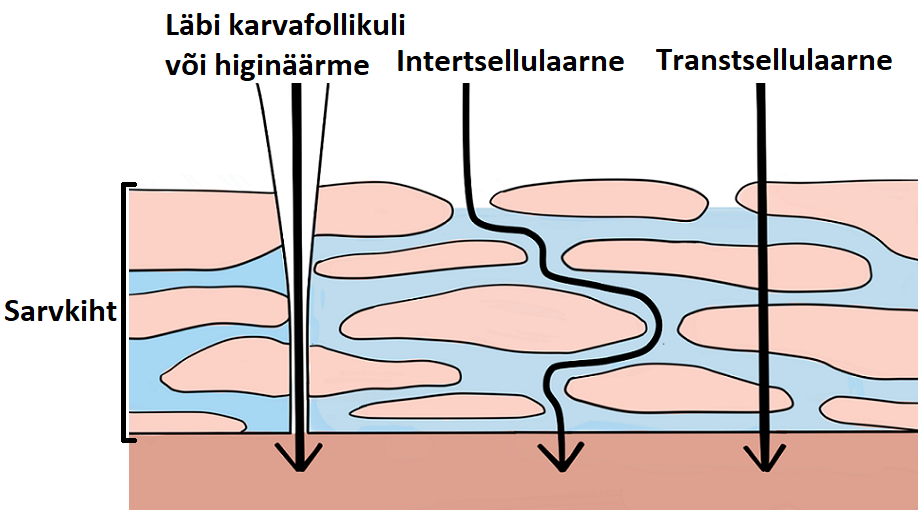 Transdermaalse transpordi viisid